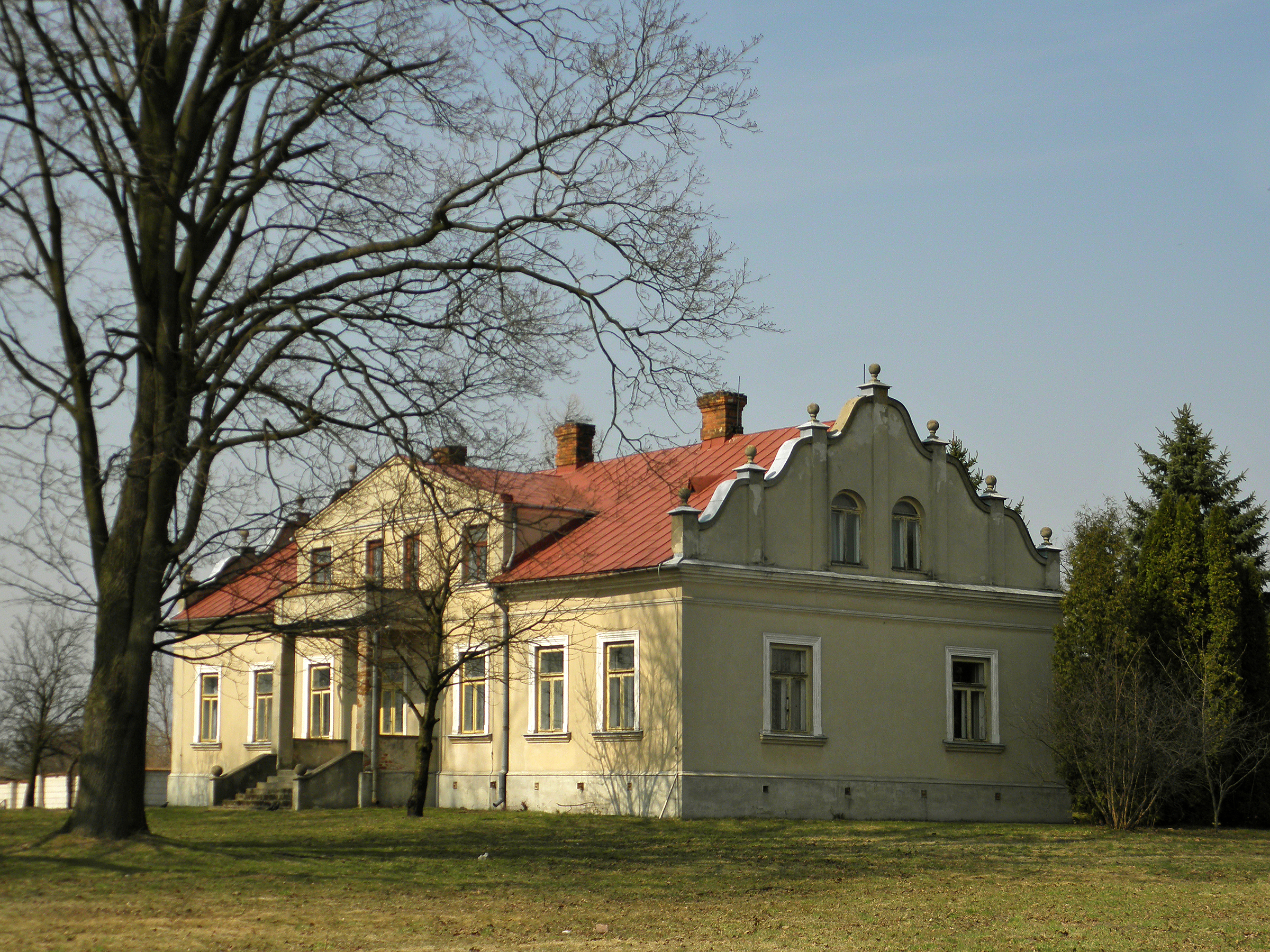 Jedlnia - budynek dawnej plebanii.